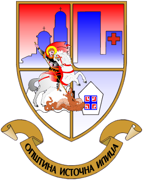 Grb općine Istočna Ilidža